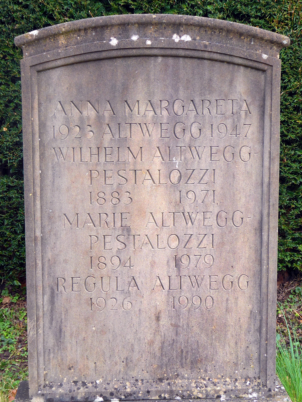 Wilhelm Altwegg-Pestalozzi (1883–1971) Altphilologe, Germanist, Pädagoge, J.P.Hebel Biograph, Präsident der Hebel-Stiftung, Familiengrab auf dem Friedhof Hörnli, Riehen, Basel-Stadt